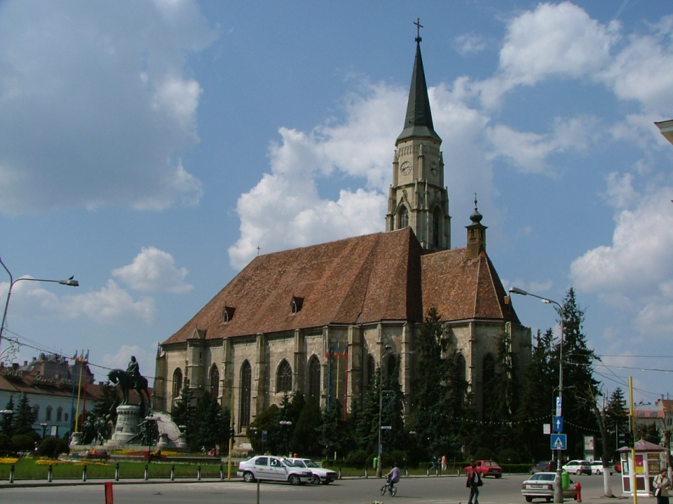 Piaţa Unirii et Biserica Sfântul Mihail vues depuis le coin sud-est.